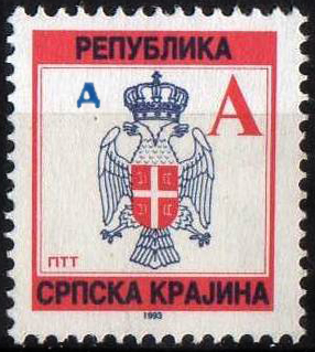 Почтовая марка Республики Сербская Краина. Провизорный выпуск Вуковара